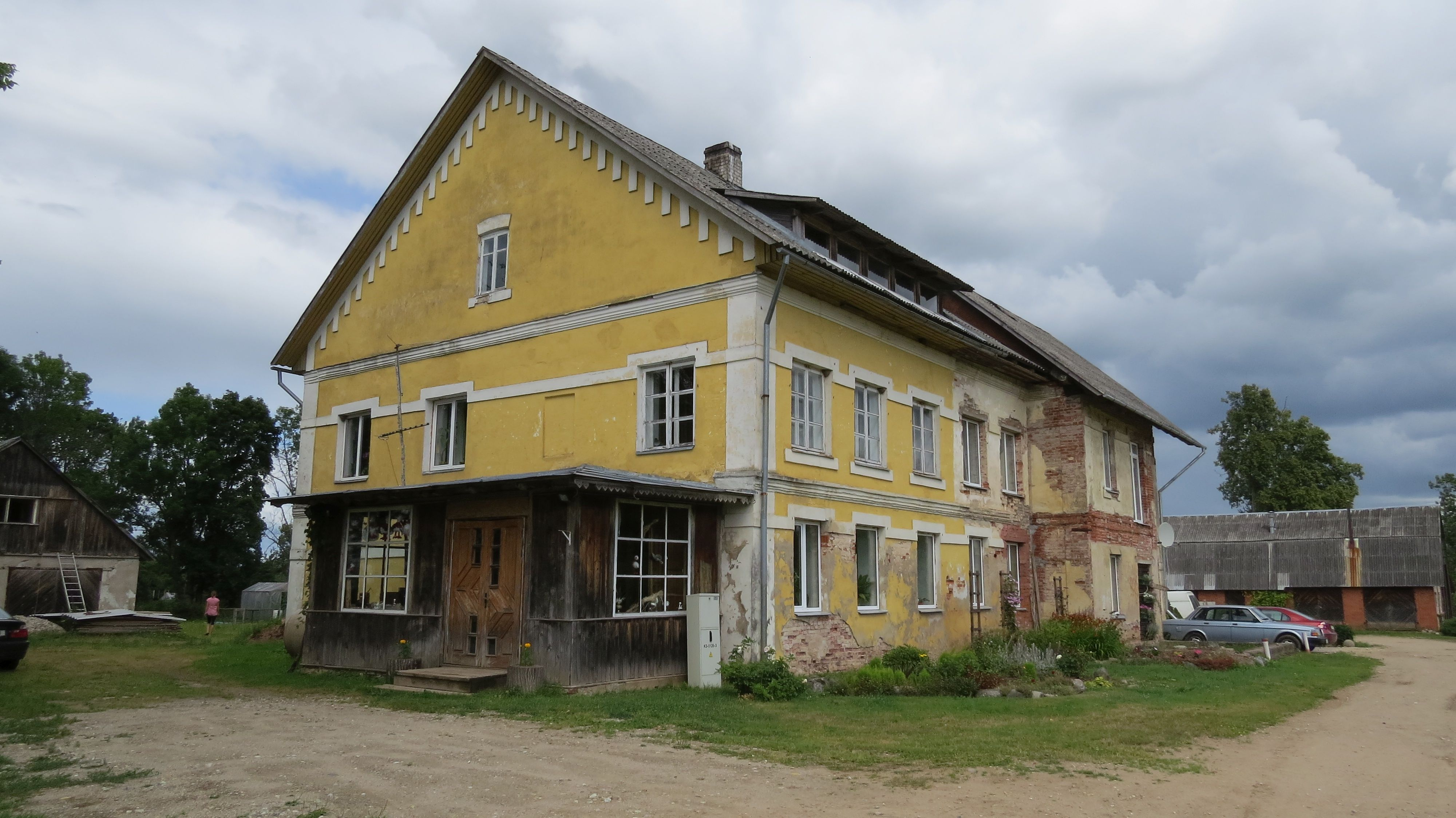 Mīlīte mõisa peahoone 2013. aastal.